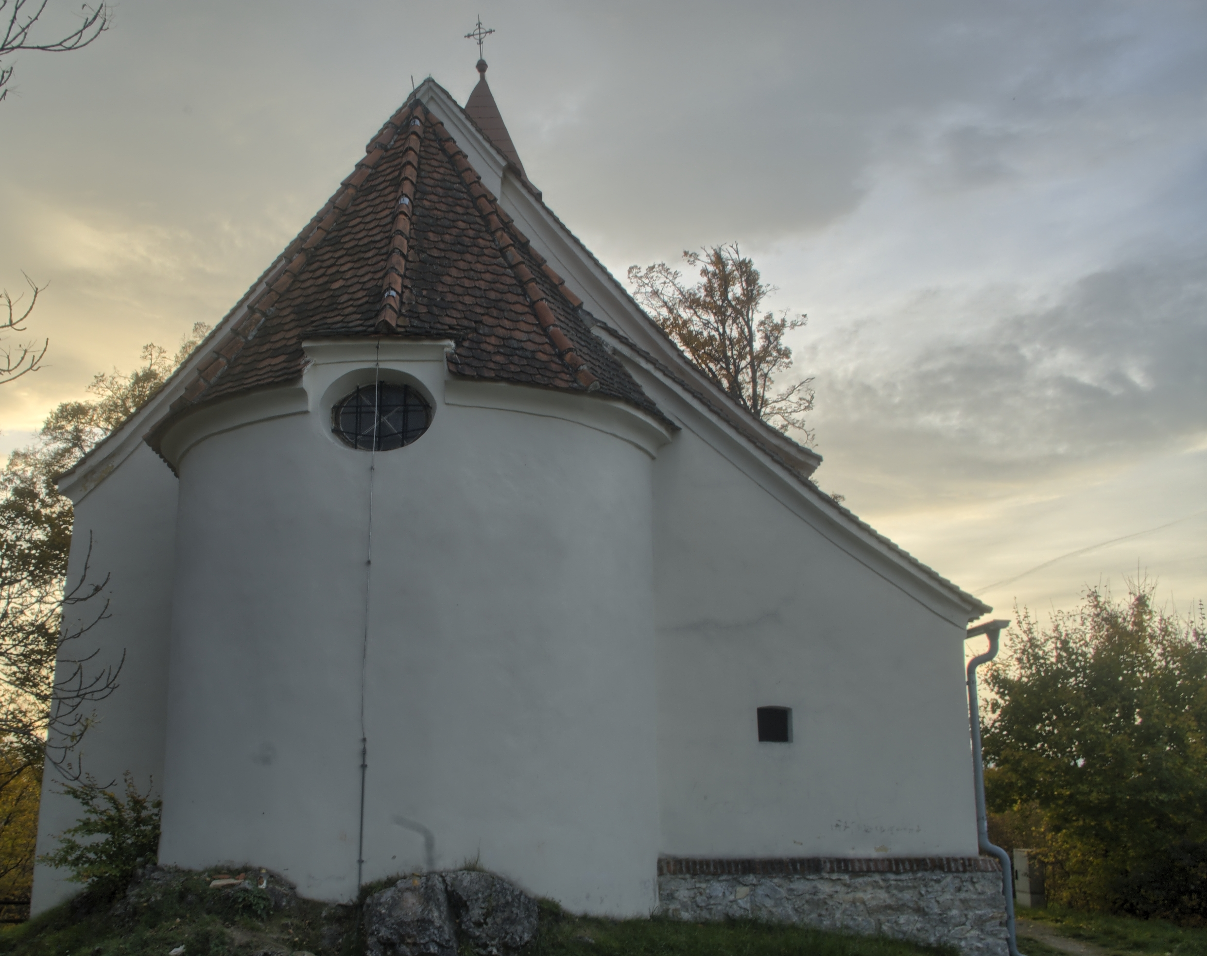 Kath. Filialkirche, hll. Johann und Paul